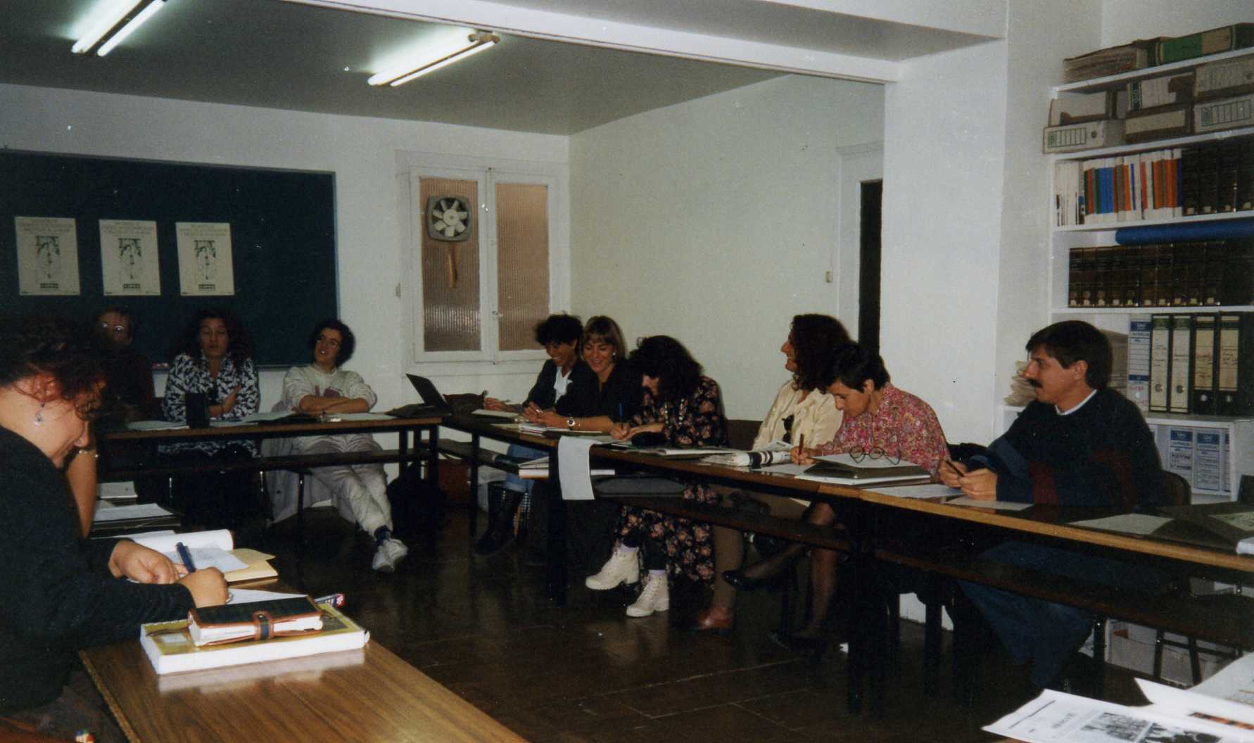 Encontro de Centros e Documentación e Bibliotecas de Mulleres en Pamplona, 1994